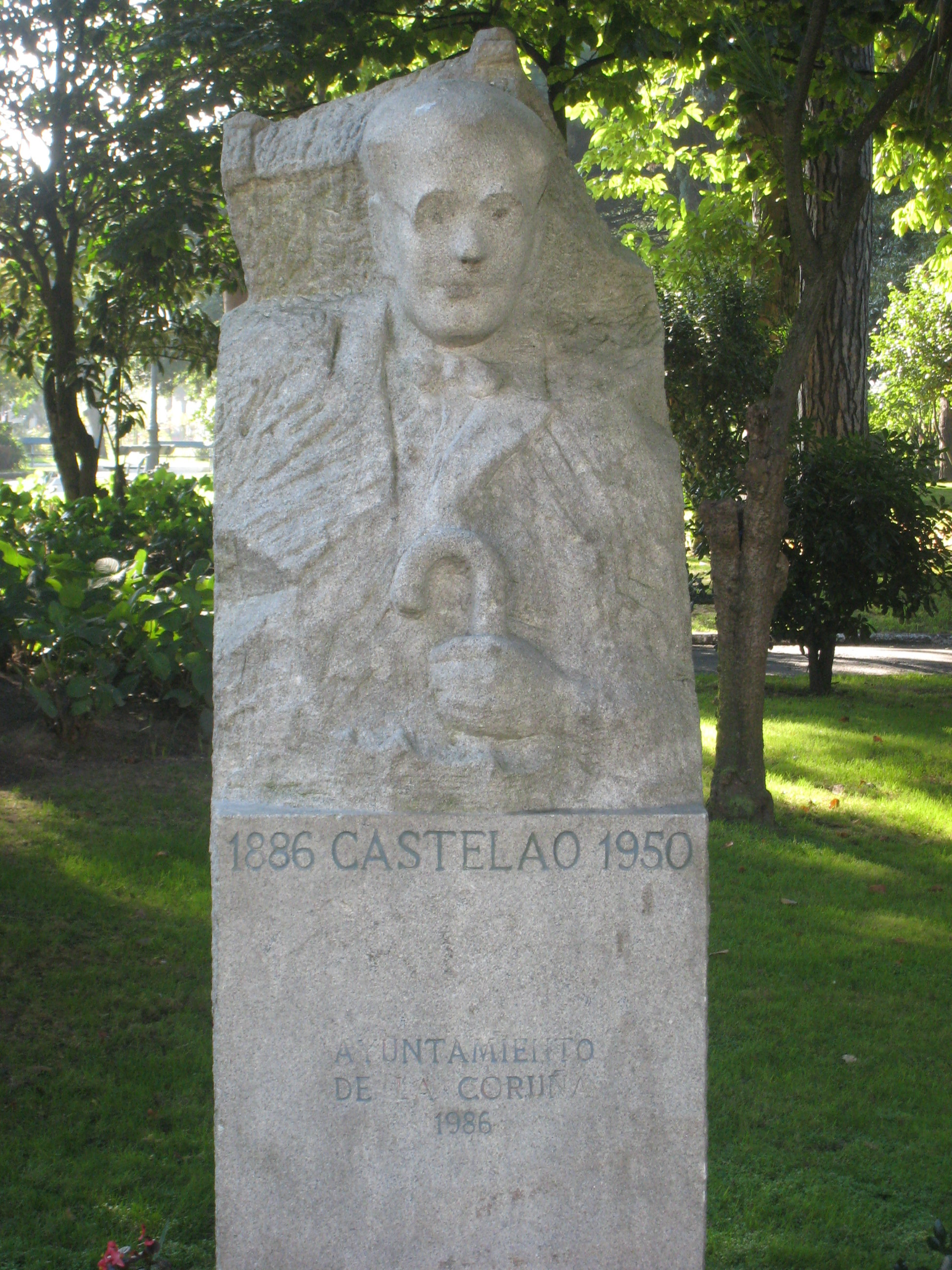 Busto de Castelao en A Coruña.